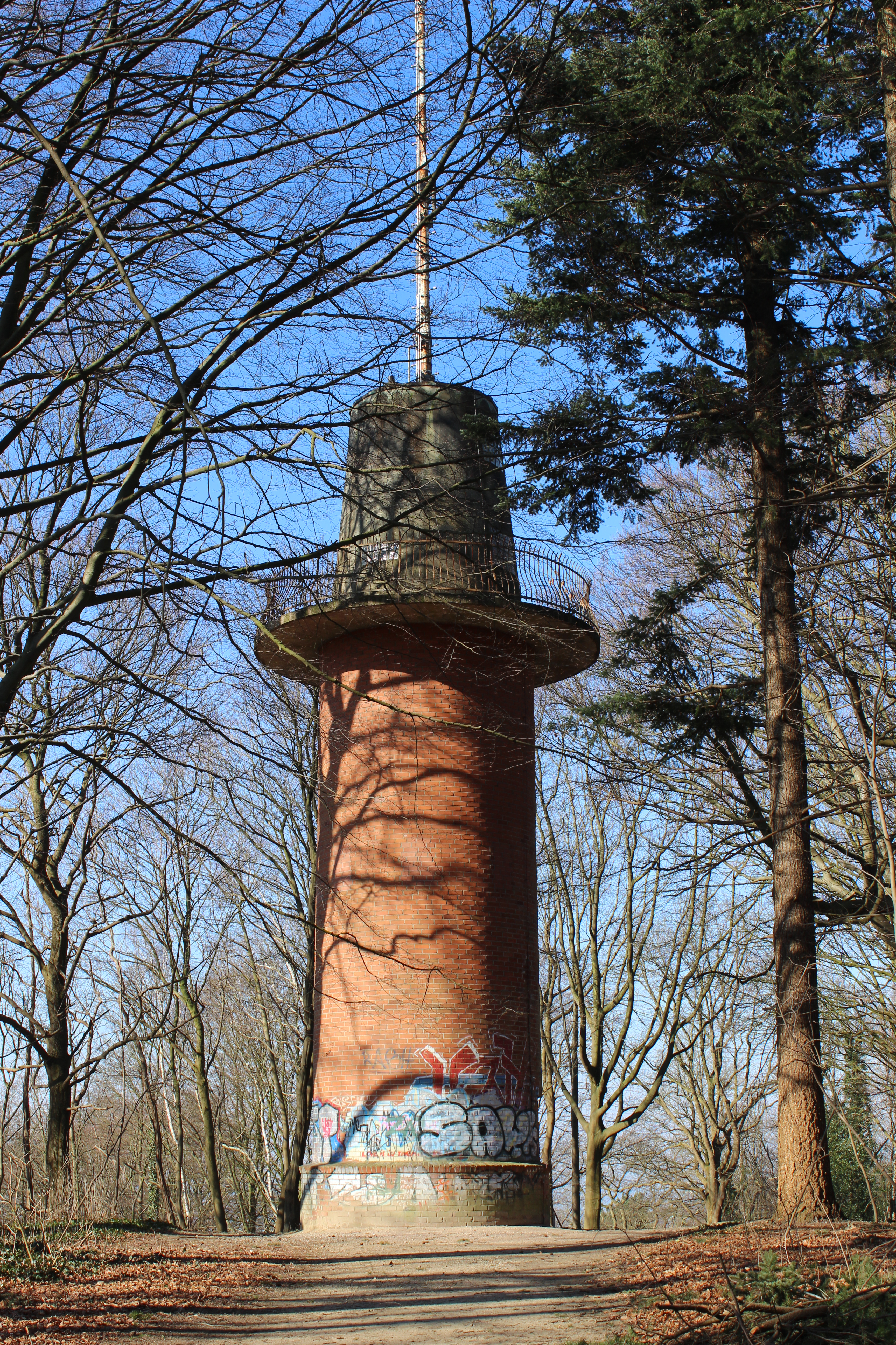 Gipfel des Wasebergs in Hamburg-Blankenese